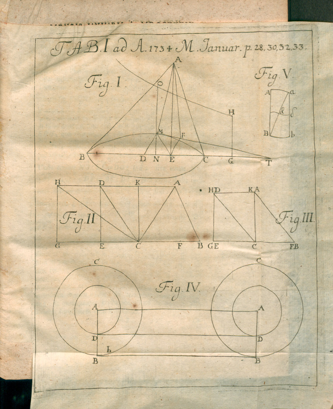 Illustration